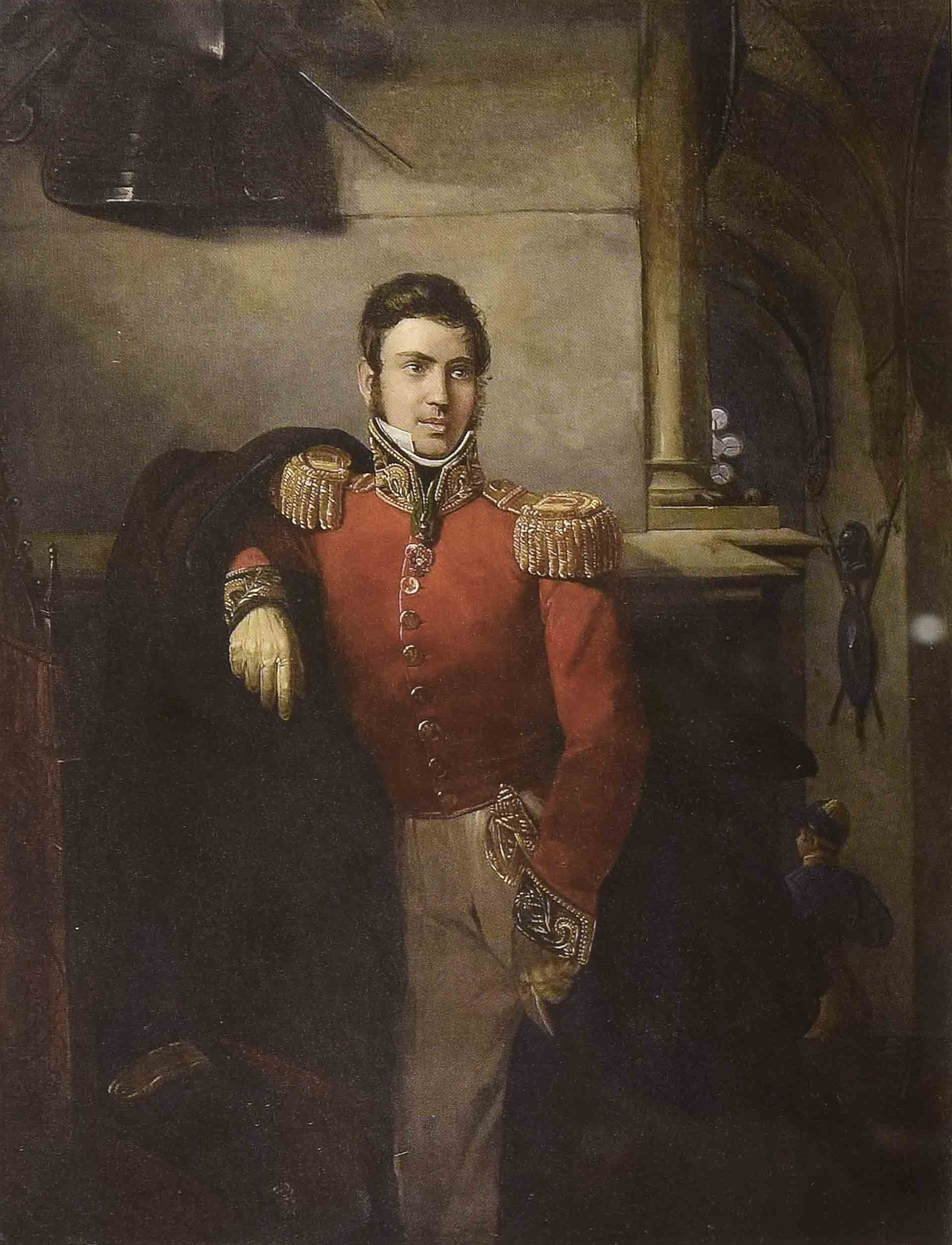 Ritratto.